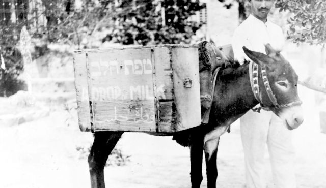 טיפת חלב